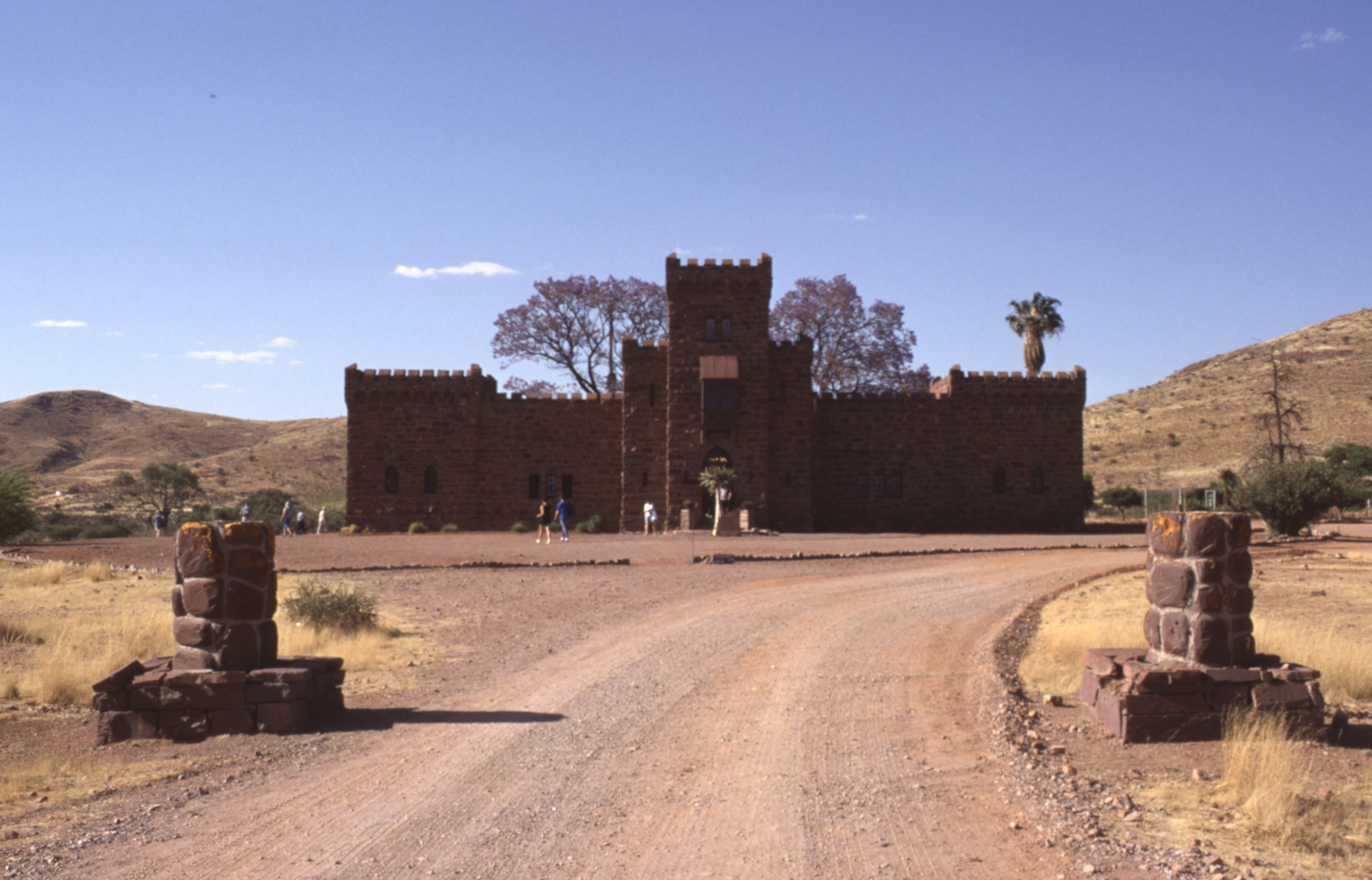 Namibia, Oktober 2002.